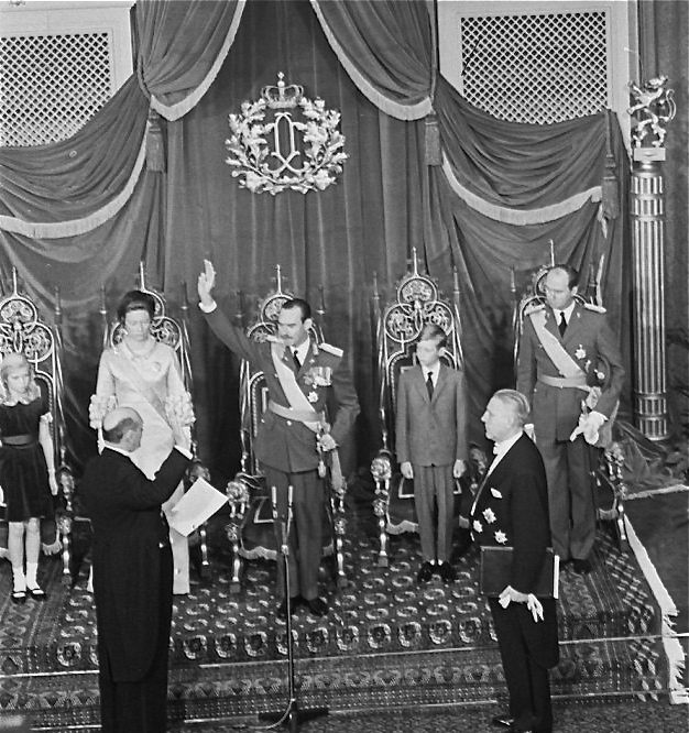 De troonwisseling in Luxemburg, de nieuwe Groothertog legt de eed op de grondwet af, naast hem echtgenote en kinderen.